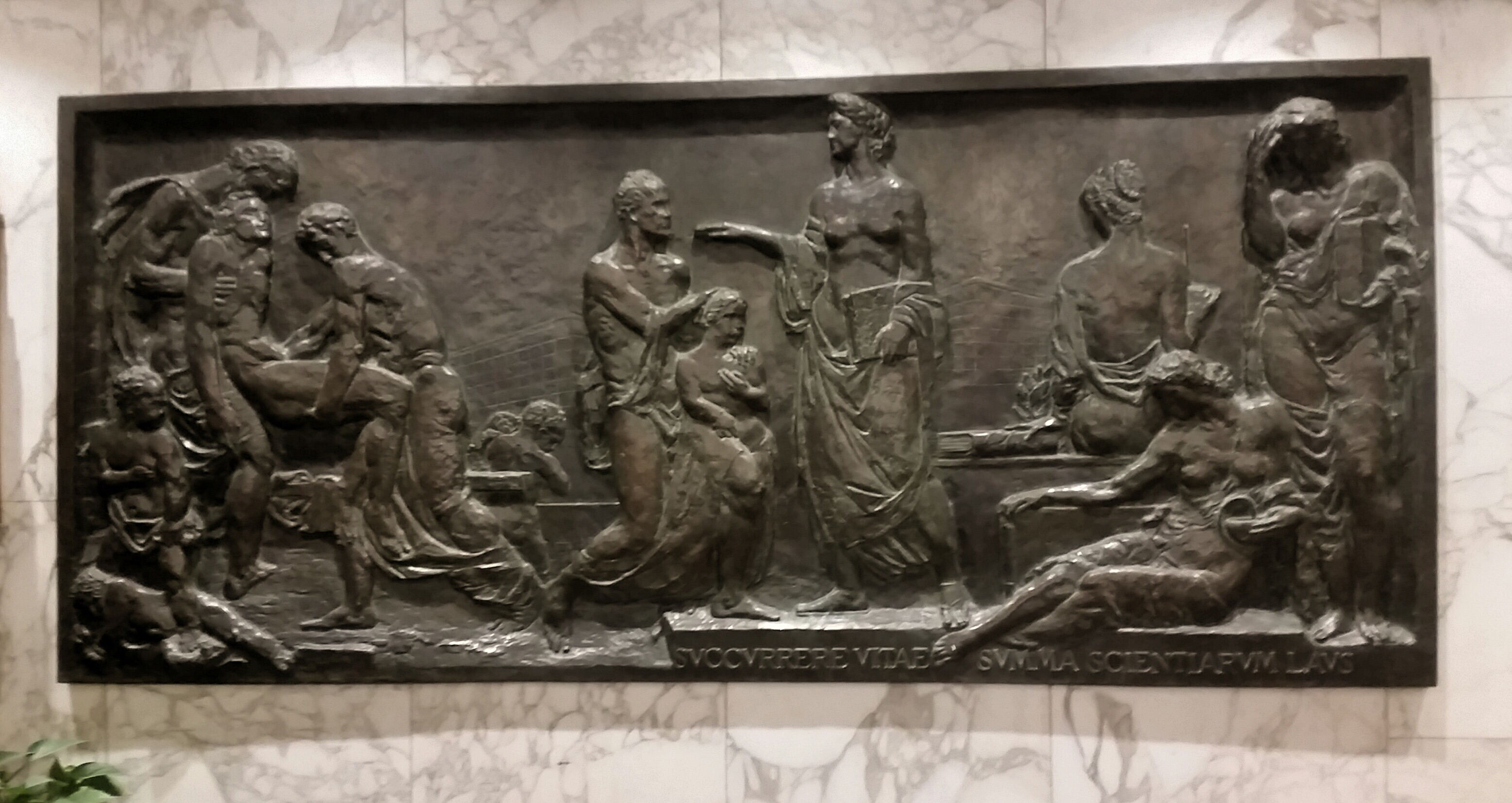 Bassorilievo in bronzo della sede Squibb, poi sede ENAV, in Via Salaria 716 con l'iscrizione latina: SUCCURRERE VITAE SUMMA SCIENTIARUM LAUS, traducibile in “Il maggior merito della scienza è il salvataggio di vite umane”